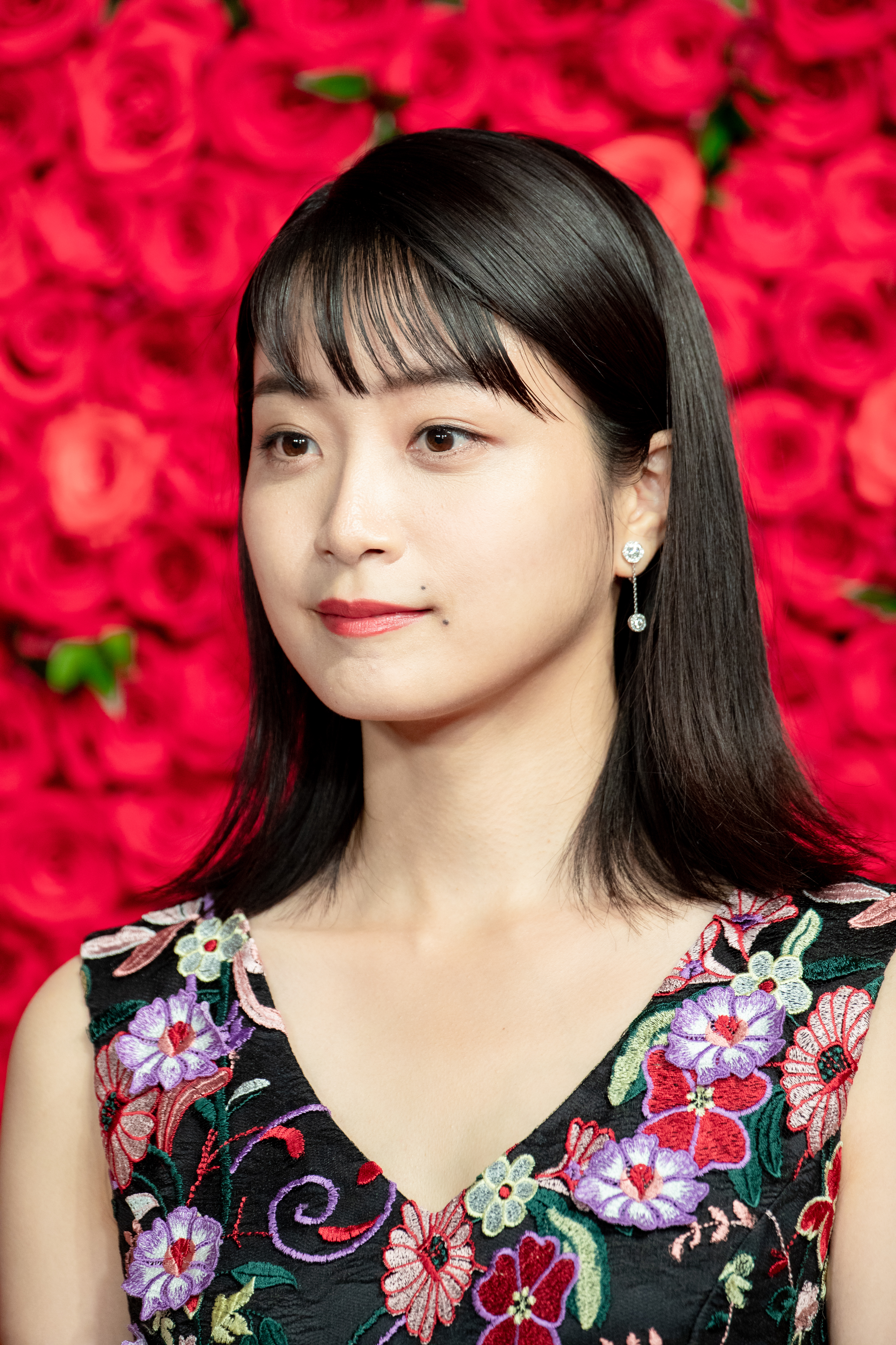 第30回 東京国際映画祭 オープニングセレモニー 深川麻衣 (愛がなんだ)